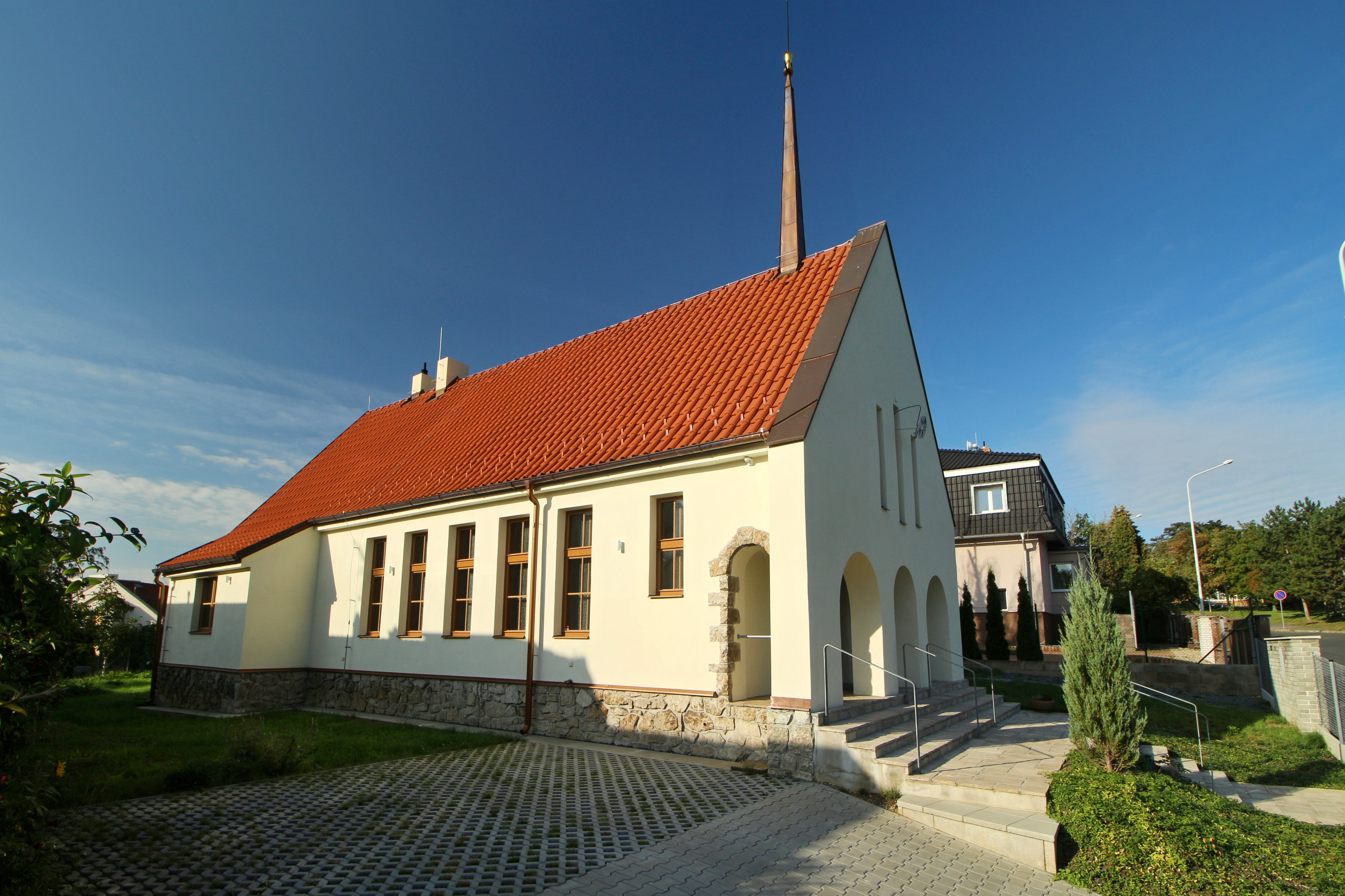 Praha 10-Malešice Milíčova modlitebna ČCE